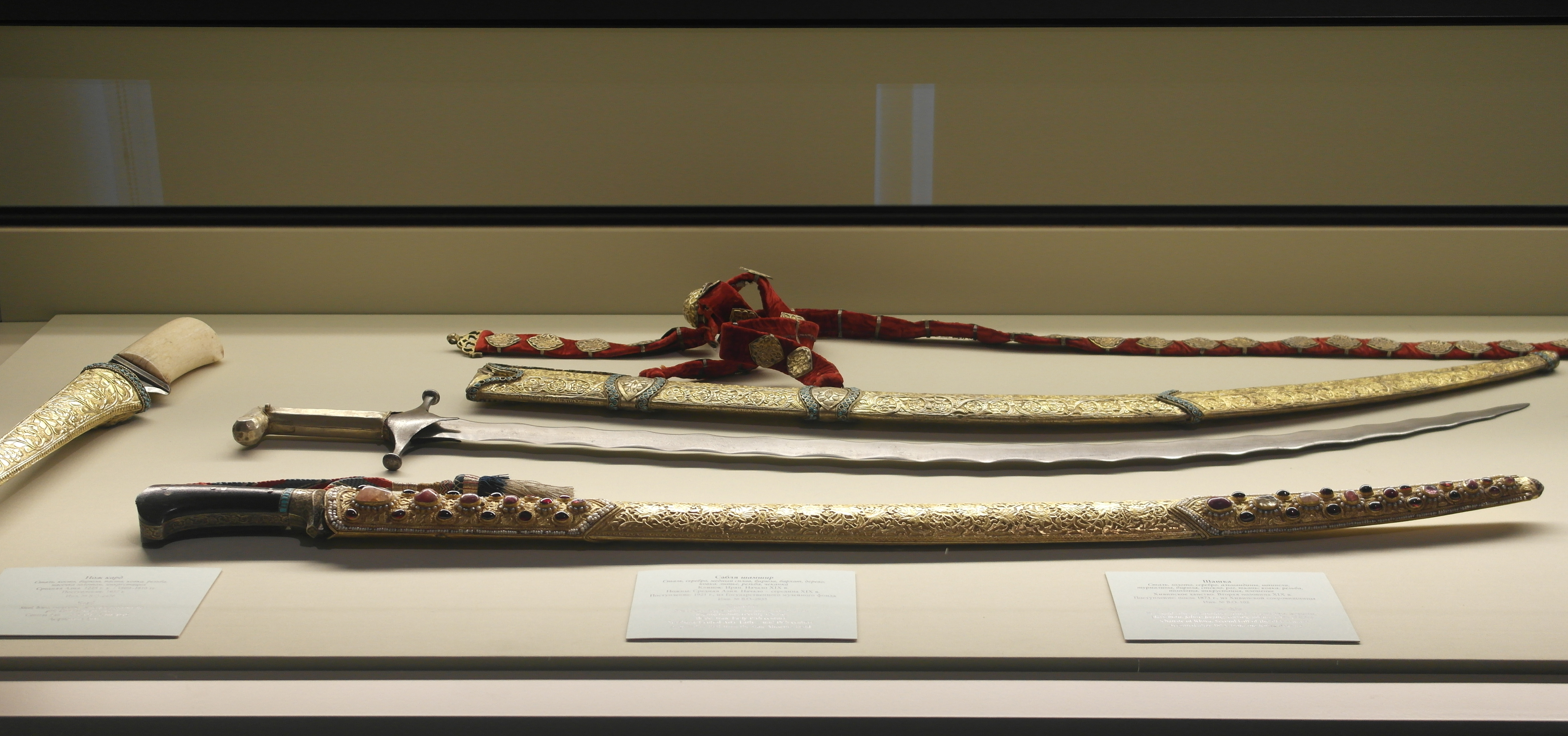 Эрмитаж - Зимний дворец - 1-й этаж - зал 65 - Восточное оружие